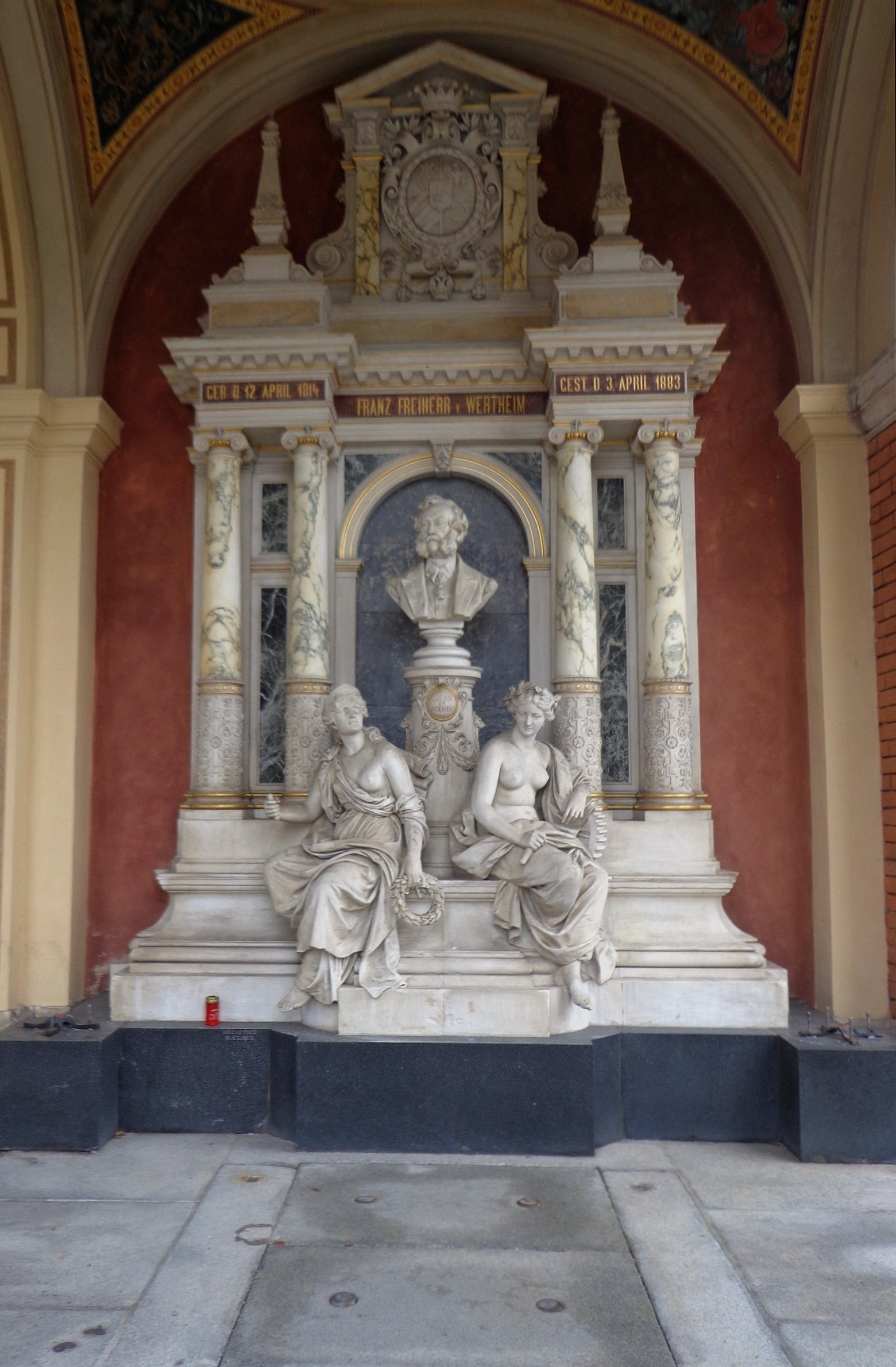 Wiener Zentralfriedhof, Alte Arkaden, Gruft Nr. 19: Grabstätte Franz von Wertheim